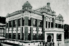 明治大学初代記念館